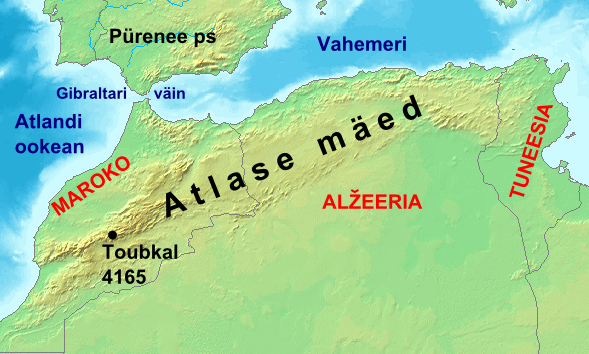 Atlase mägede kaart